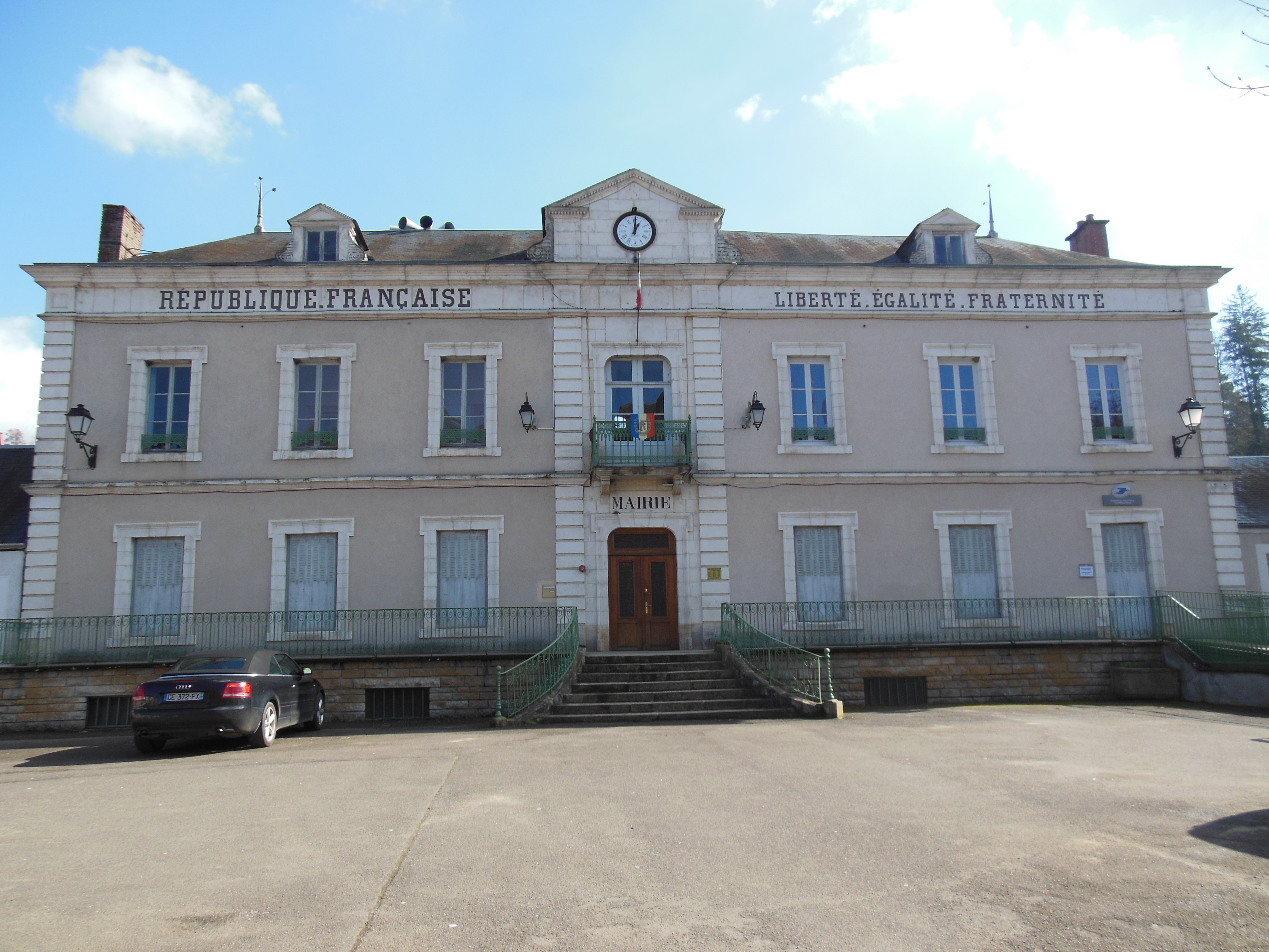 Mairie-école de Châtel-Censoir, Yonne, Bourgogne, France.